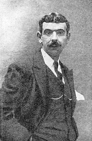 Jesús Rey Alvite, fotografía en Vida Gallega 1915